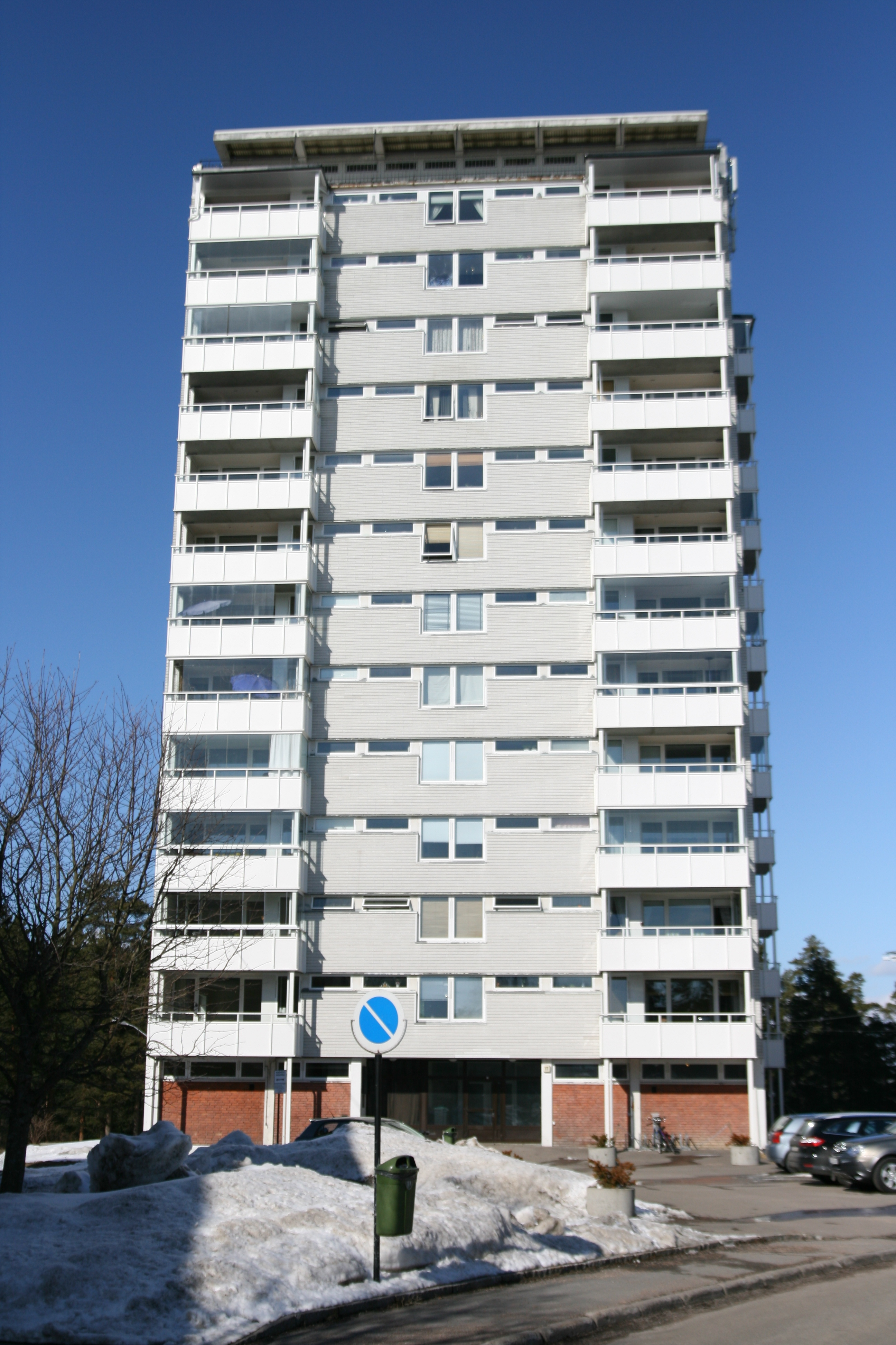 Kranveien 17 på Oppsal i Oslo.